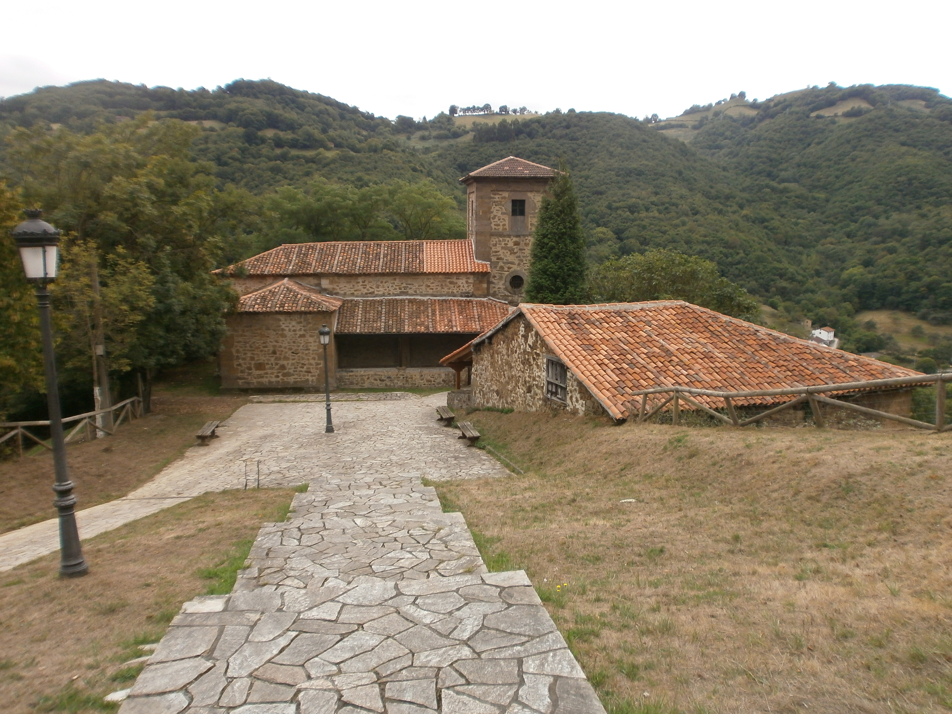 Santuario de los mártires Cosme y Damián Mártires de Valdecuna